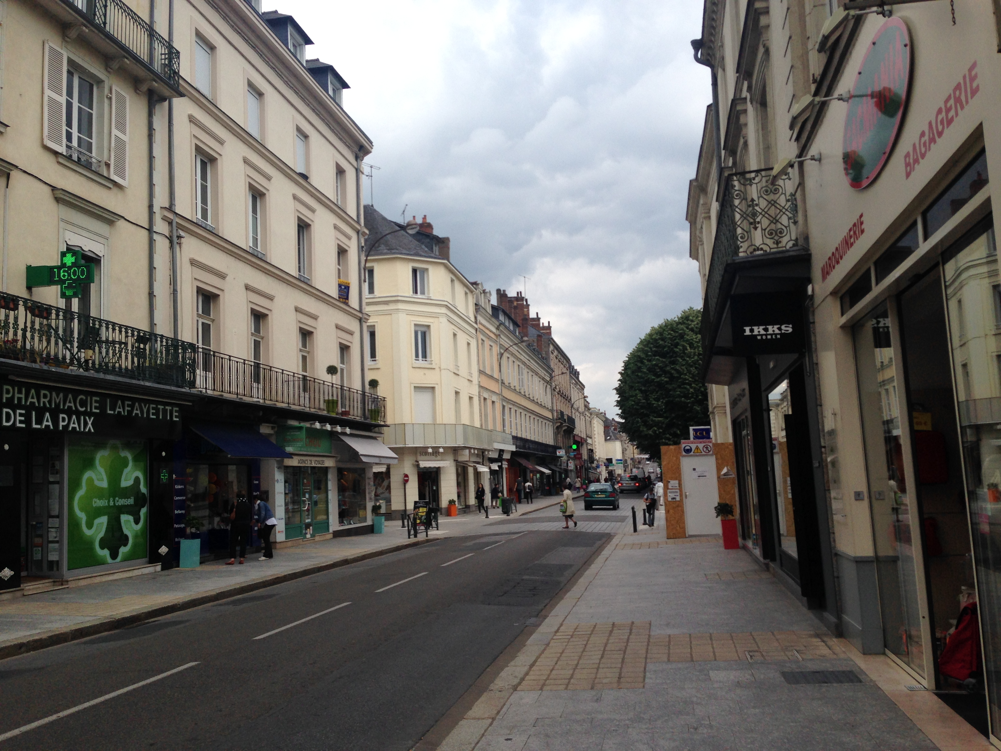 法国城市拉瓦勒的一条街道